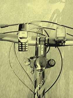 VTT 3310